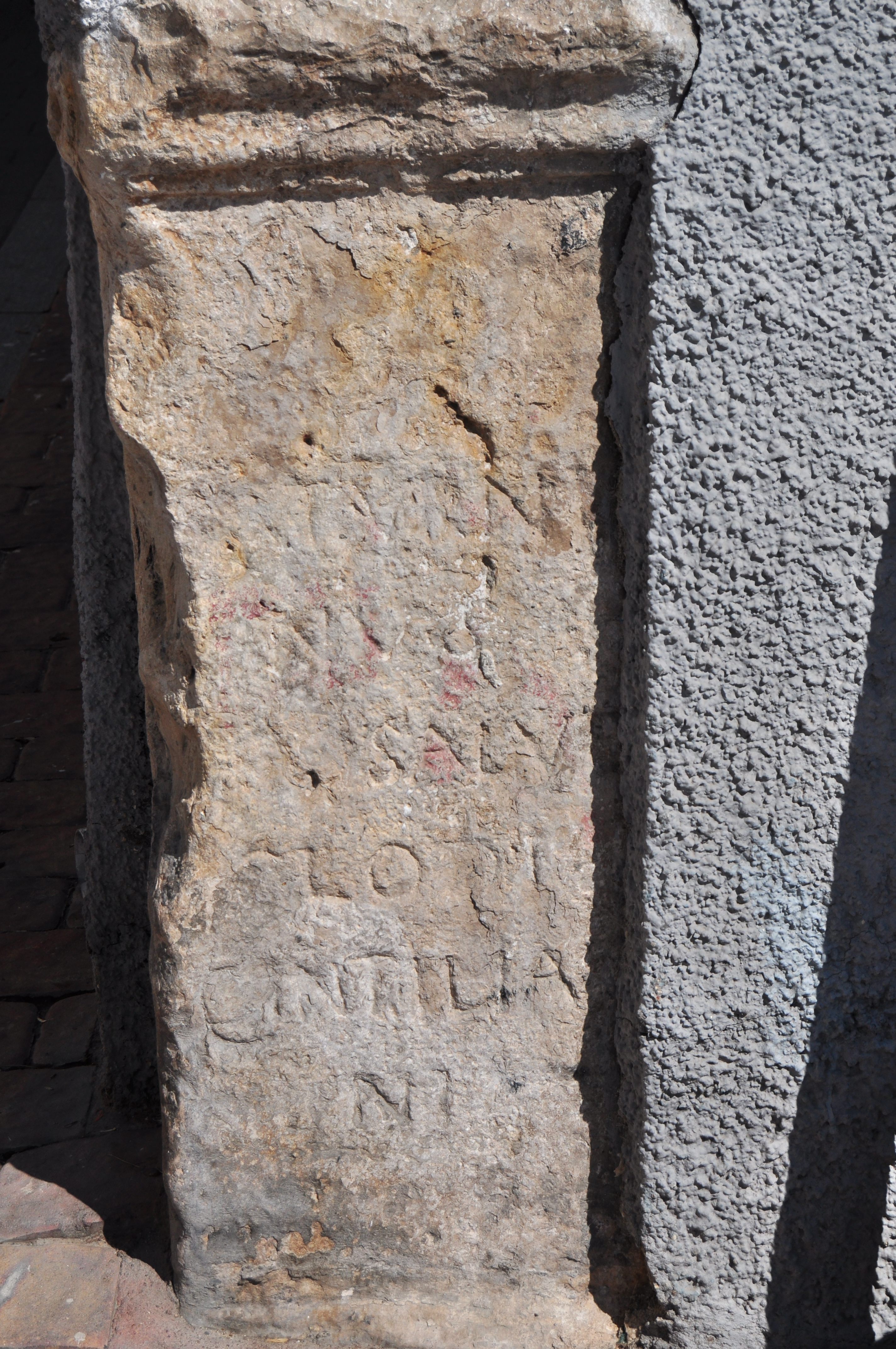 Carabaña - 012